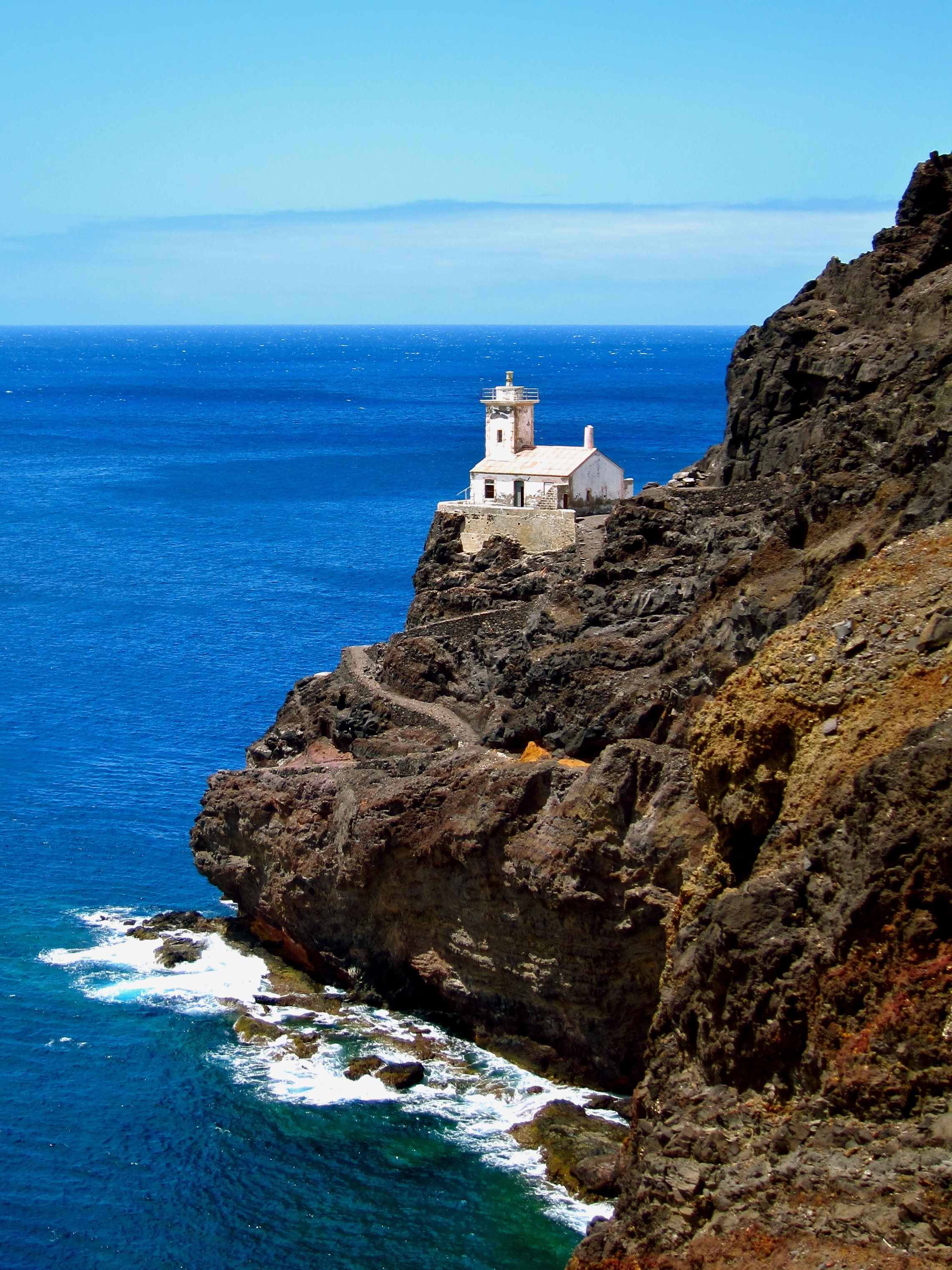 Farol de D. Amélia, farol da Ponta Machado ou farol de São Pedro. Localizado na ponta Oeste da Ilha de São Vicente, marcando a entrada do canal entre São Vicente e Santo Antão.